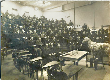 Professeur James Law, fondateur du Cornell Veterinary College, Ithaca (État de New York), assis, en pose photographique lors d'une conférence. On note la présence d'un modèle anatomique de cheval en papier mâché du docteur Louis Auzoux.